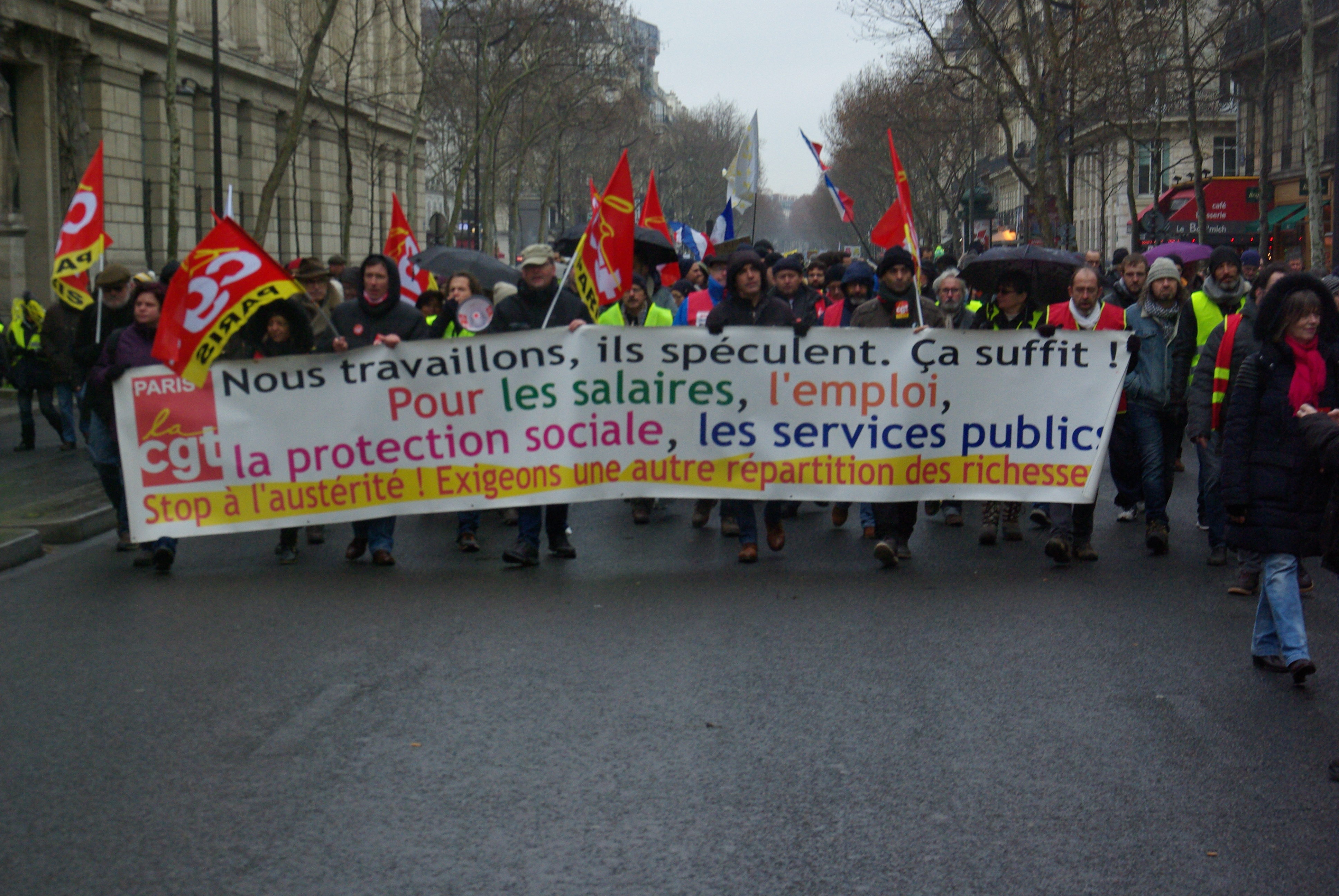 banderole de la CGT dans le cortège des GJ pendant l'acte 10 à Paris